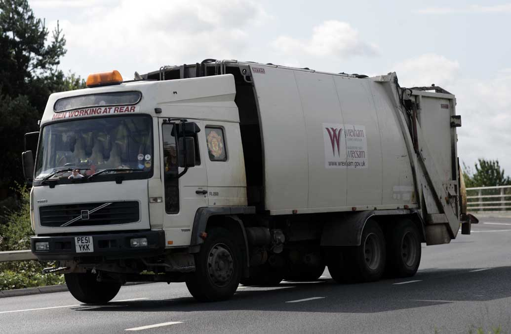 WREXHAM